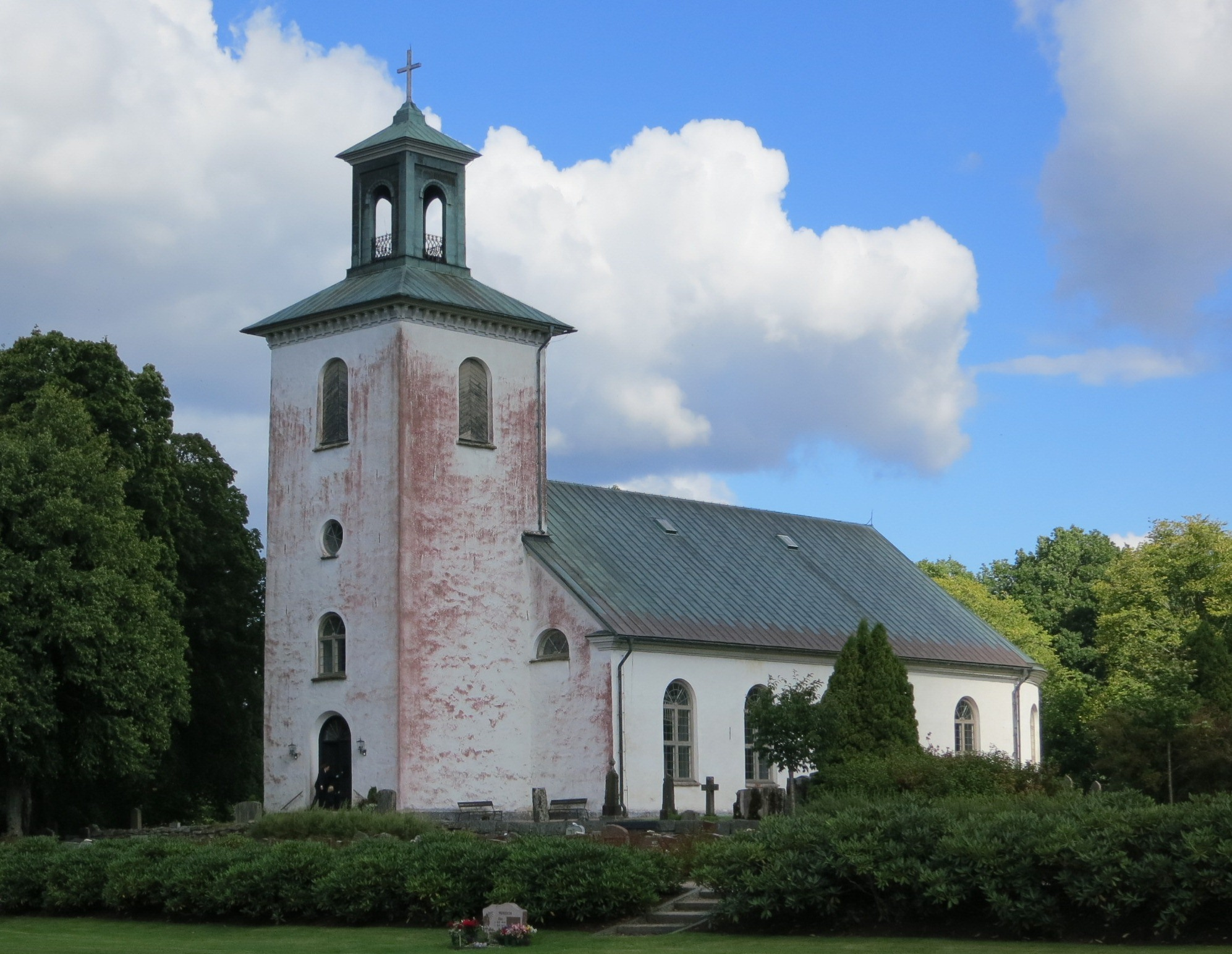 Färgaryds kyrka i Hylte kommun i Halland